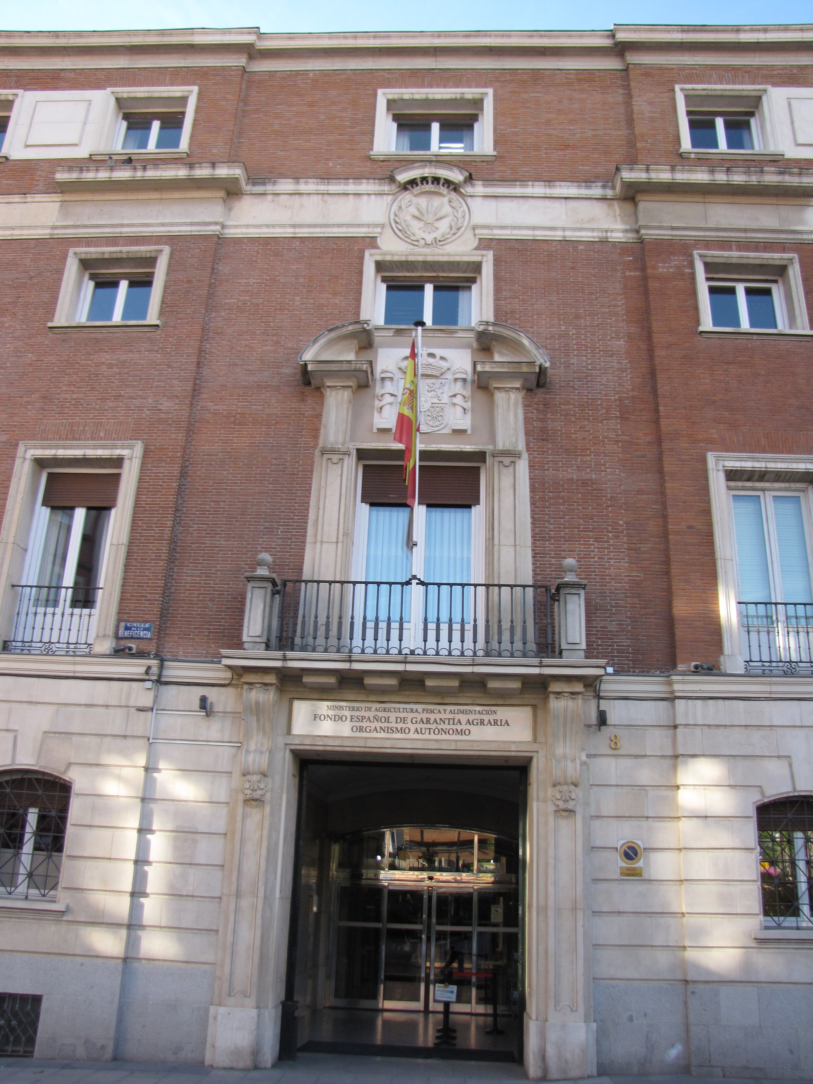 Fotografía de un detalle del cuerpo central del palacio de Veragua.